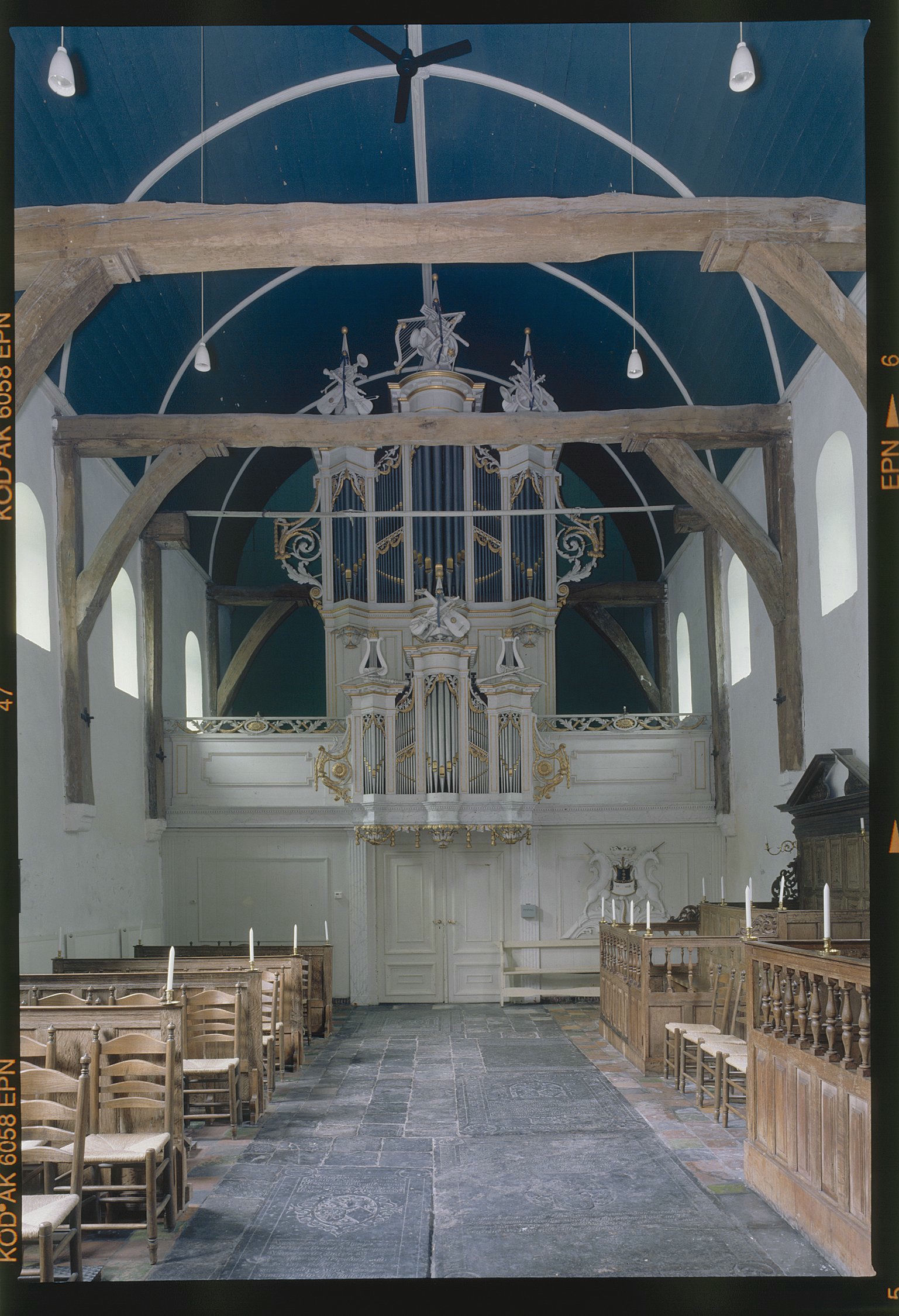 Nederlands Hervormde Kerk: Interieur, aanzicht orgel, orgelnummer 754 (opmerking: Gefotografeerd voor Het Historische Orgel in Nederland 1790-1818)